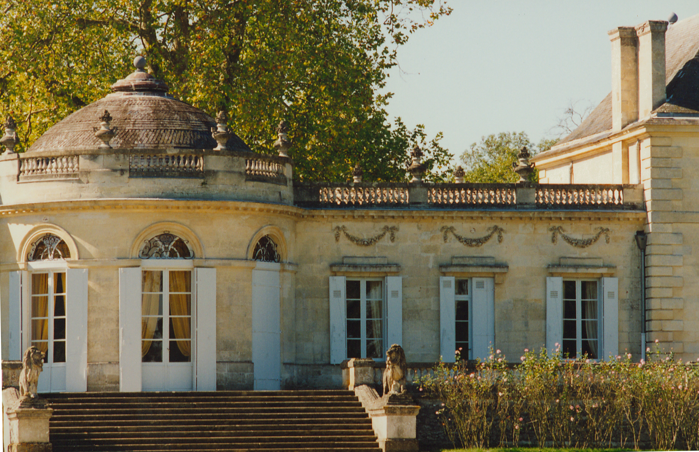 Château de Tauzia, construit à la fin du XVIIIe siècle par l'architecte du grand théâtre de Bordeaux, Victor Louis ; il a été classé monument historique en 19659.